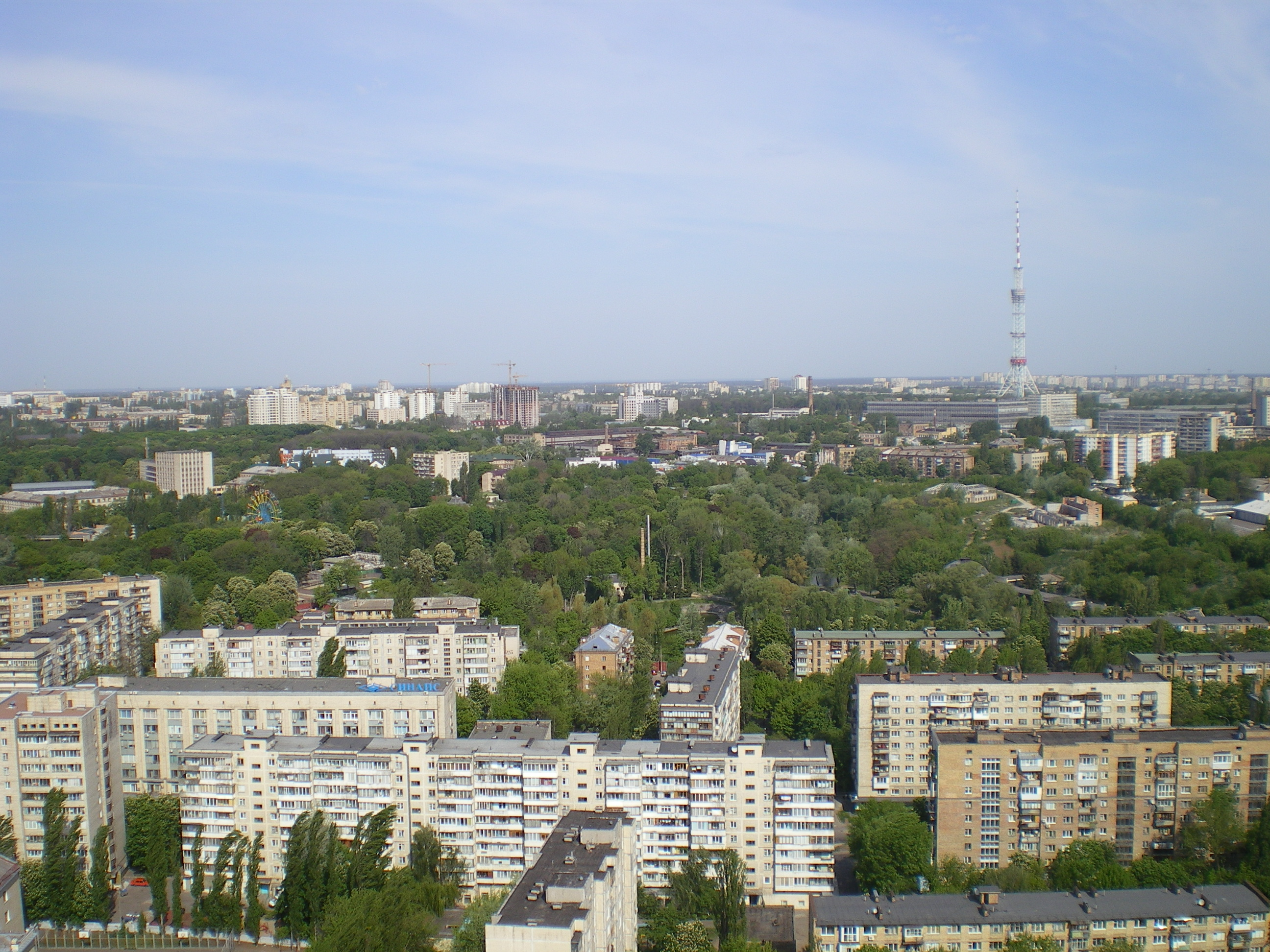 Киевский зоопарк и чёртово колесо Вид от ул. Гали Тимофеевой